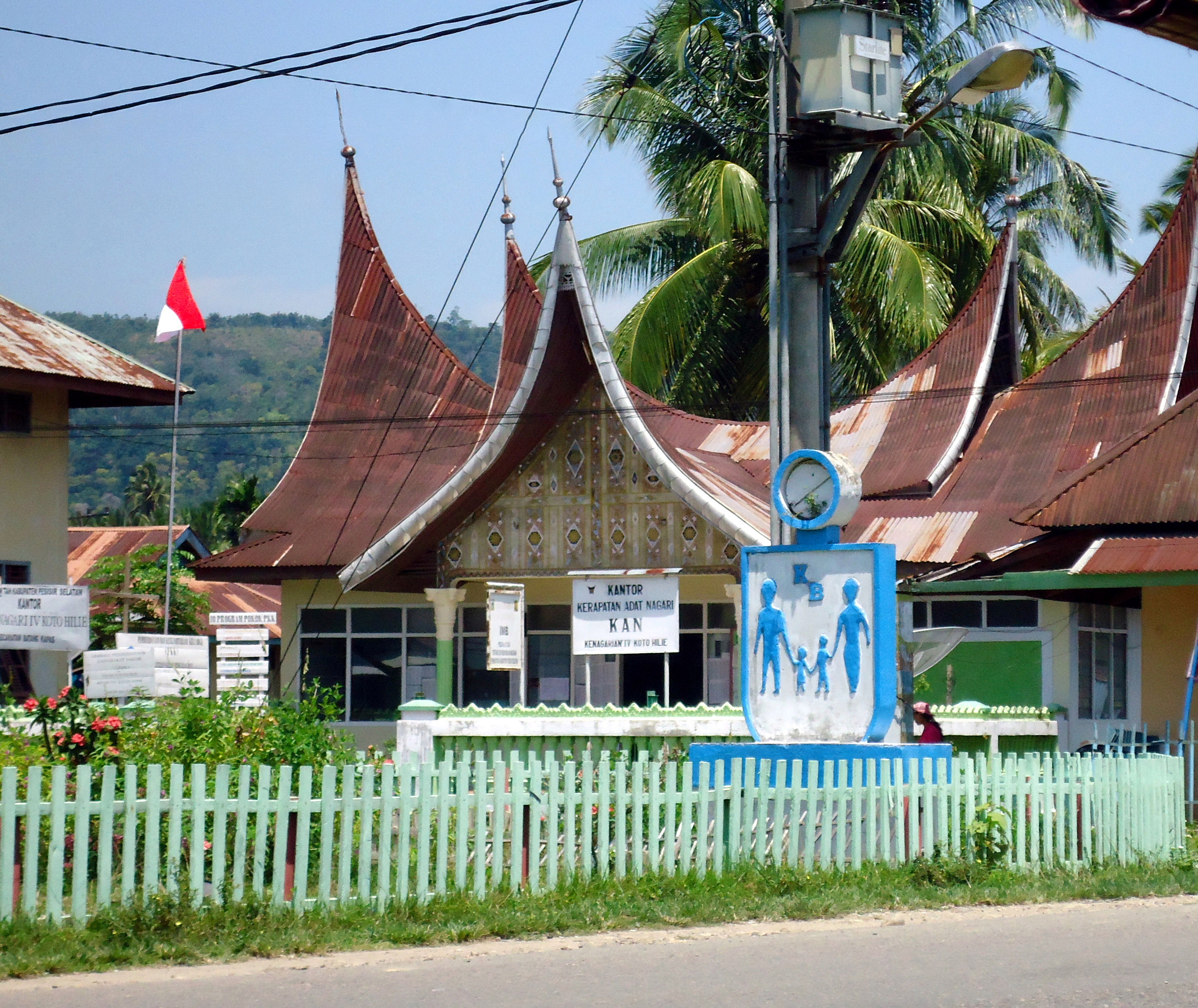 Kantor Wali Nagari IV Koto Hilie